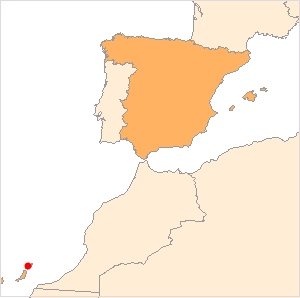 Lanzarote un haritadaki yeri